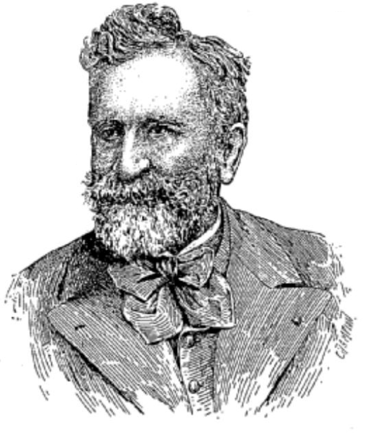 Portrait (gravure) d'Henri d'Arbois de Jubainville